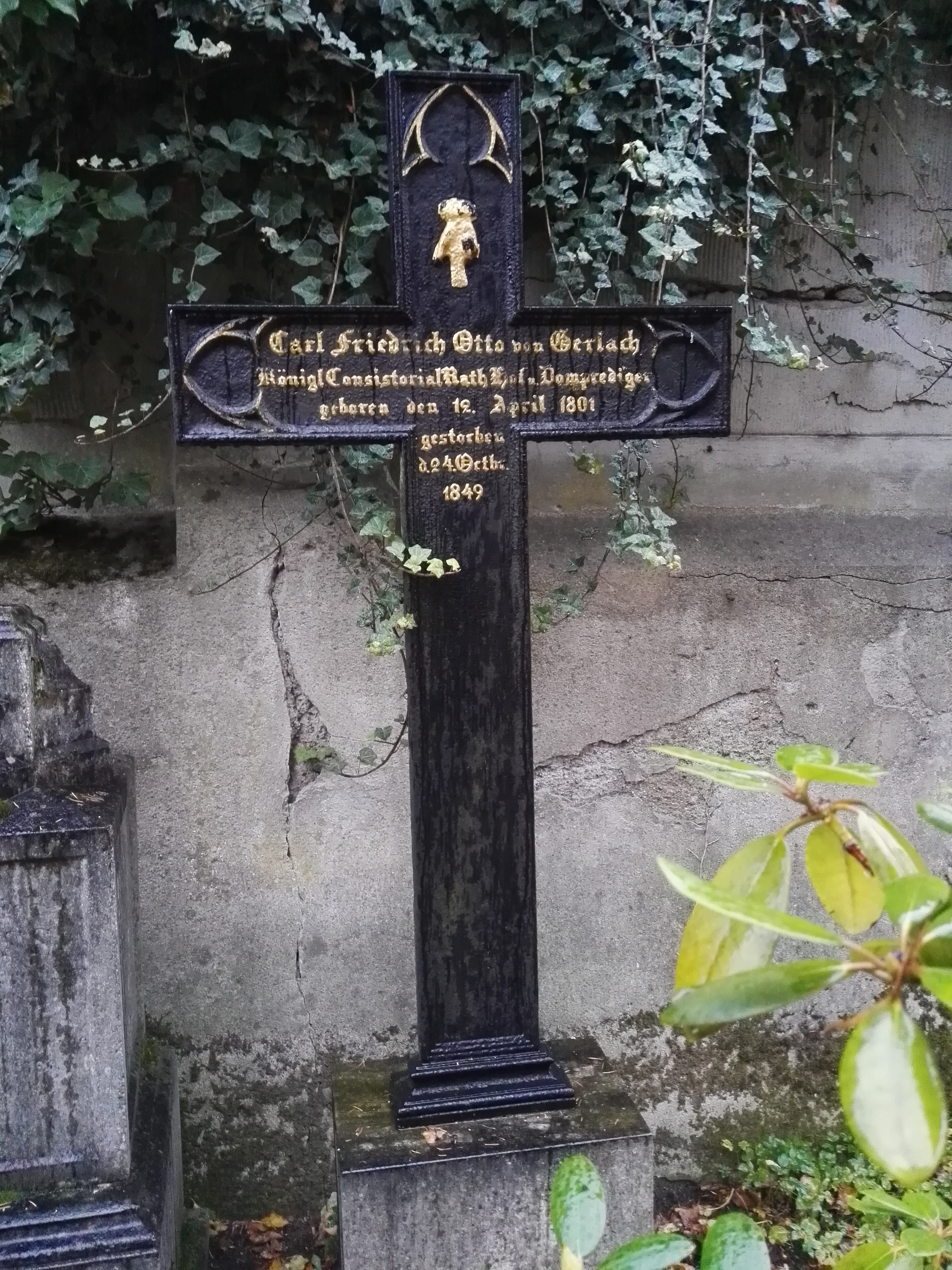 Grab von Carl Friedrich Otto von Gerlach auf dem Dom-Friedhof II in Berlin-Mitte